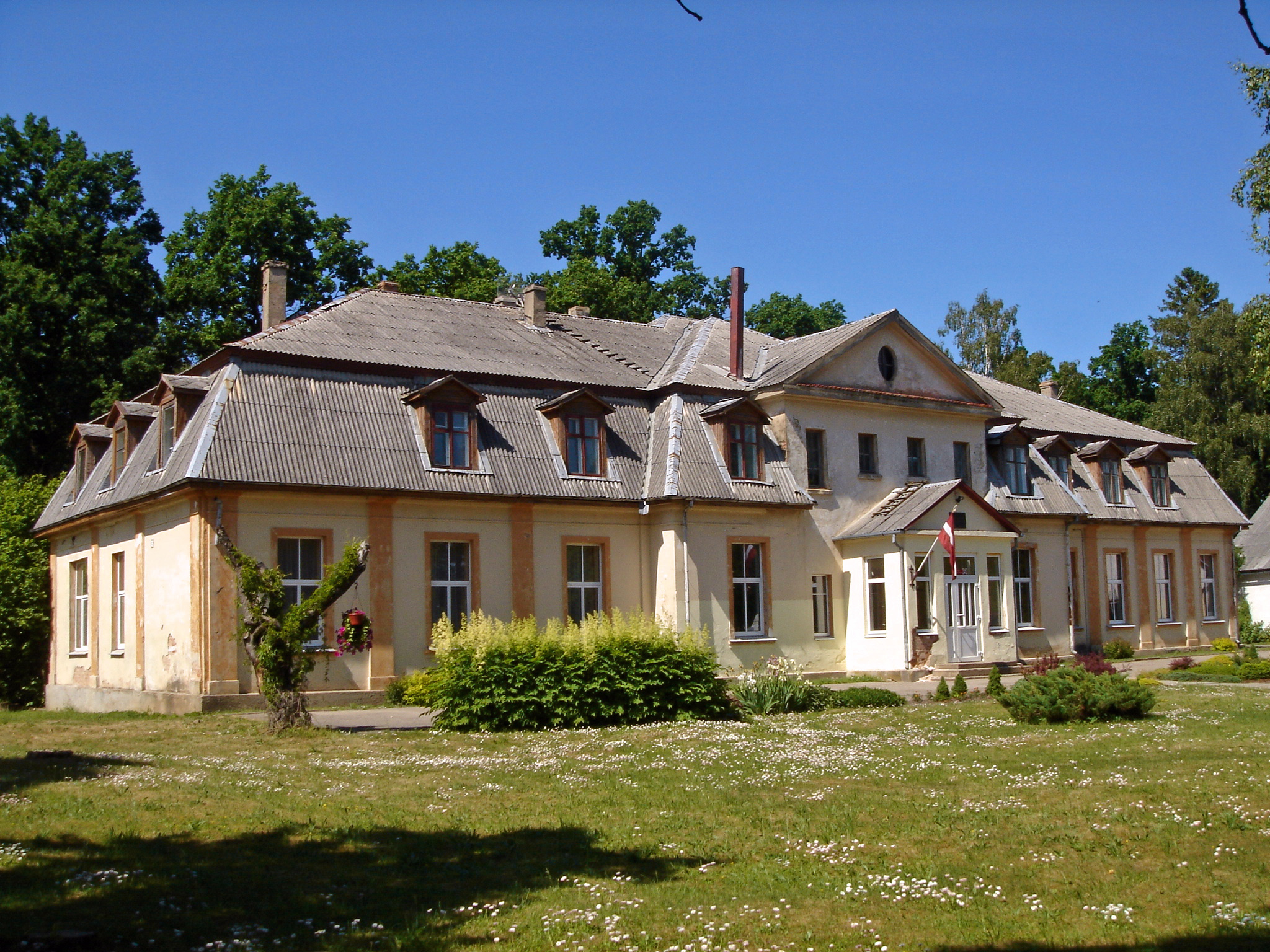 Bijusī Auru skola